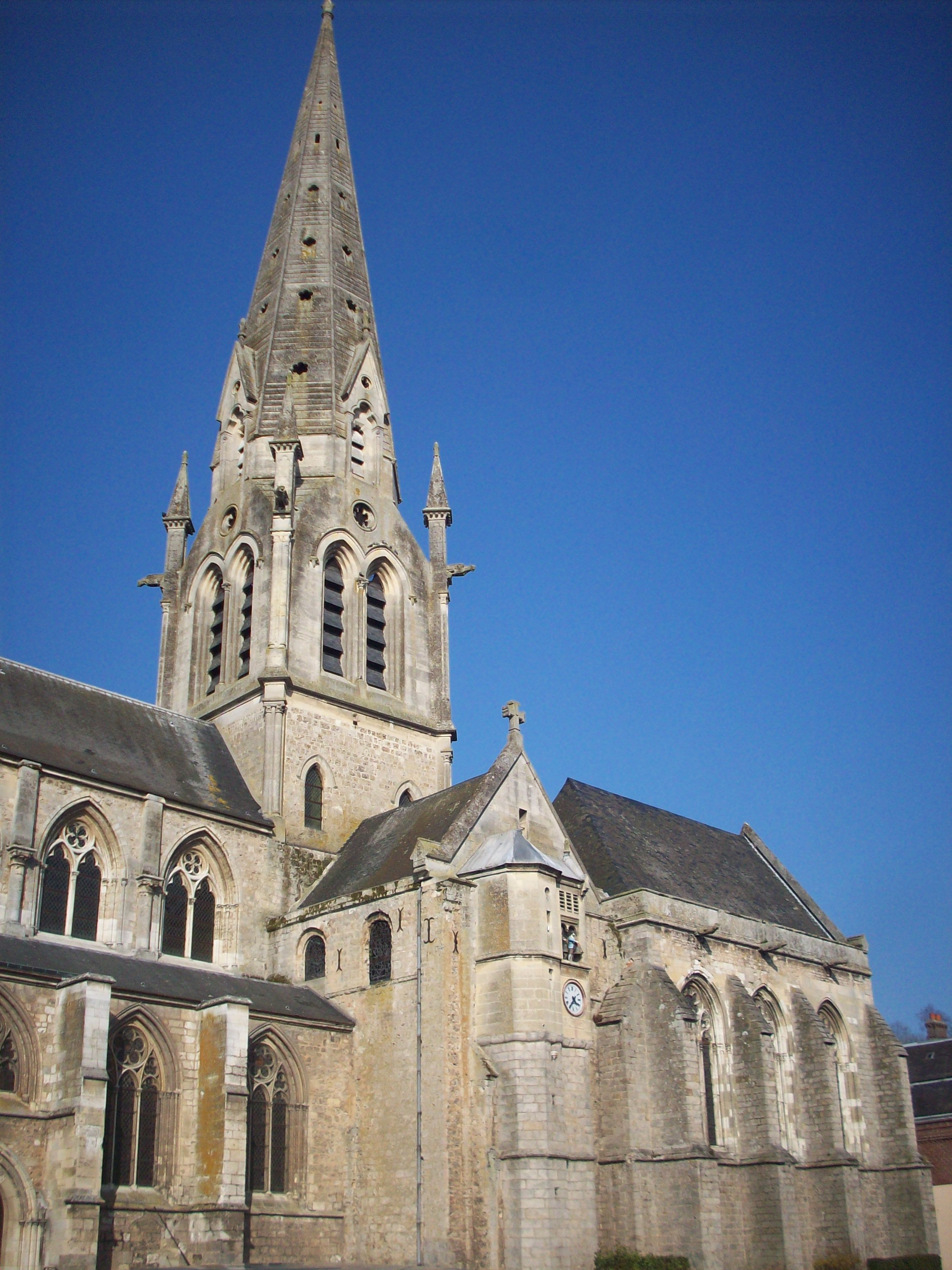 Transept et chevet de la collégiale.